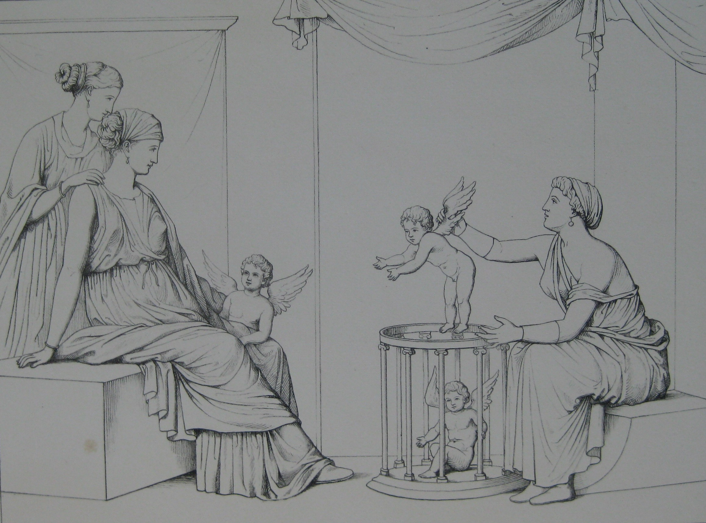 Die Amorettenverkäuferin, farbiges Fresko aus Stabiae bei Pompeji, jetzt Neapel, Museo Nazionale, gezeichnet von Wilhelm Zahn, für den Druck lithografiert von Rohn (vor 1859)